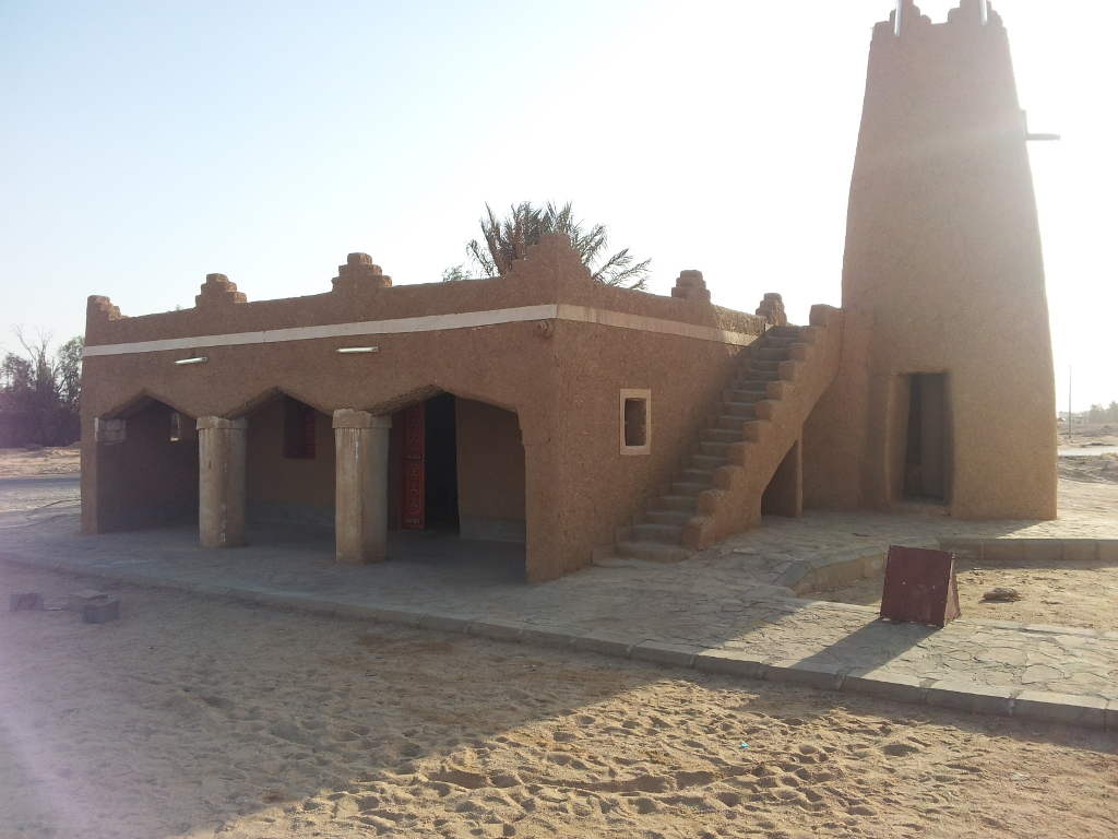 مسجد الشبيبية في محافظة البدائع بعد إعادة ترميمه عام 1429 هـ.